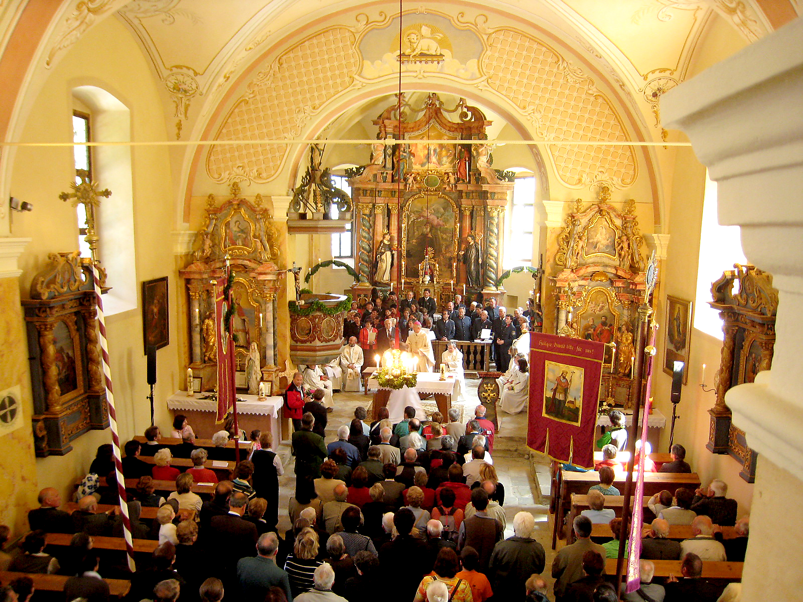 St. Anton in Bachholz, Gemeinde Aibl, Steiermark, Innenraum, Weihe nach der Restaurierung 2007